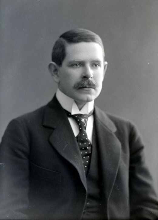 Norsk (bokmål): Henrik Ameln (1879–1961), norsk dispasjør, advokat og politiker (H).